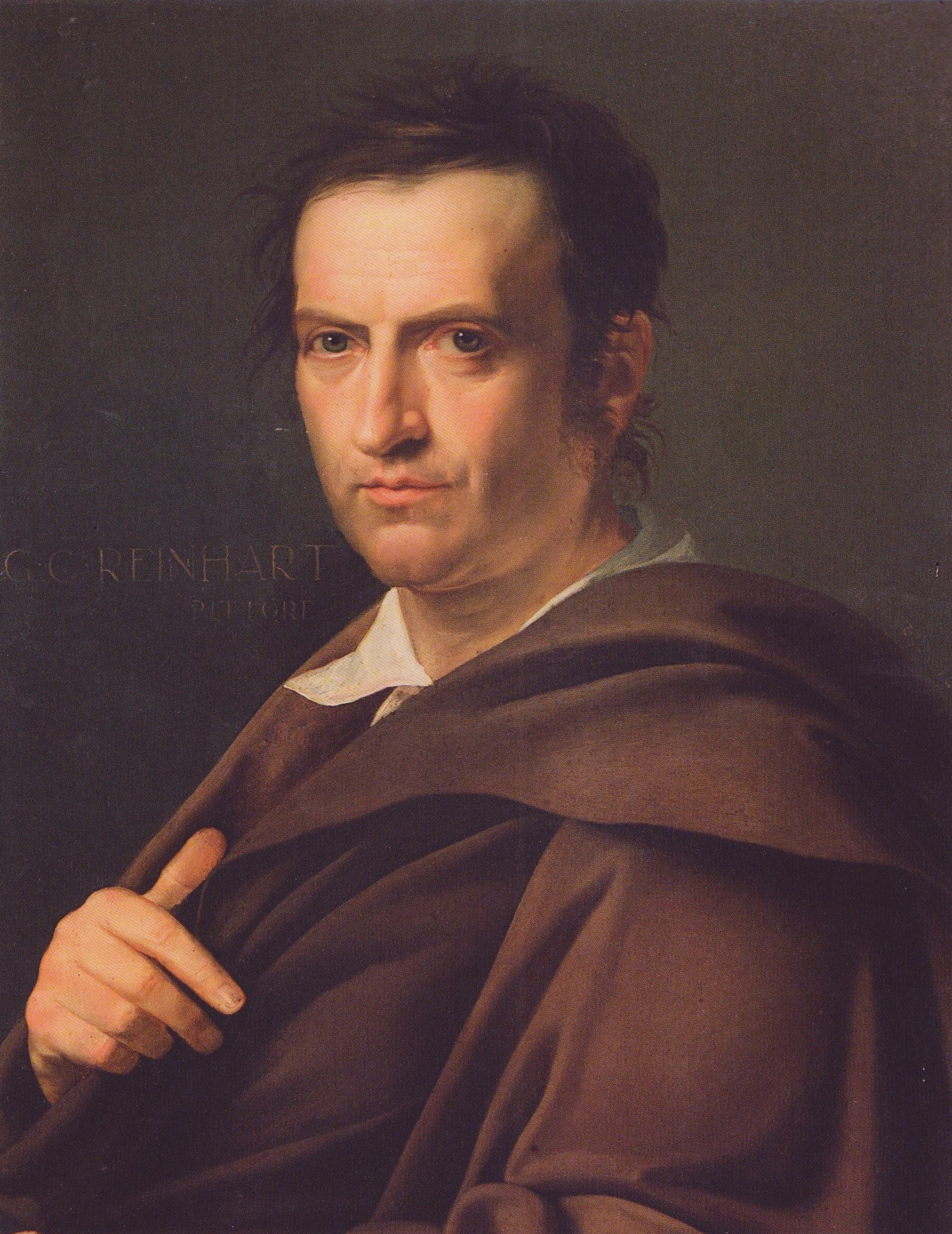 José de Madrazo y Agudo: Bildnis Johann Christian Reinhart mit übergeworfenem Mantel. Öl auf Holz, 1812, 63x49 cm. Rom, Galleria dell' Accademia di San Luca.